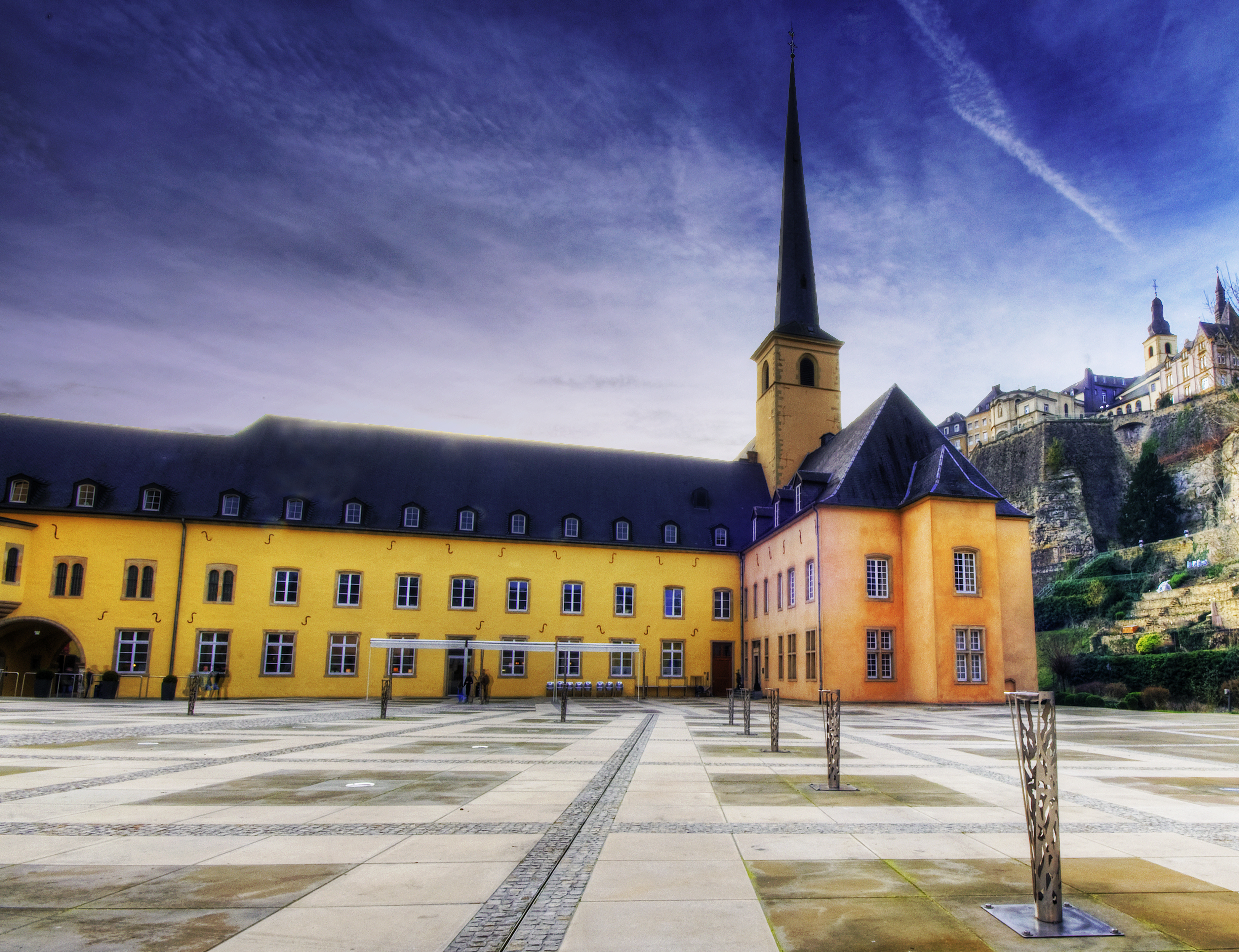 See thelarge view! 1606 gouf mam Bau vun der Abtei Neimënster ugefaangen, nodeems d'Benediktinerabtei Almënster schwéier beschiedegt gi war. D'Gebaier ëmfaassen d'Kierch St. Jean a véier Gebaier, déi ronderëm e Bannenhaff leien. Fir d'éischt war d'Klouschter e Militärhospiz bis 1867, duerno bis 1980 Männerprisong. Hautesdaags ass et e sozio-kulturellen Zentrum. Den CCRN begräift dräi Gebaierbléck, déi no Leit genannt sinn: Lucien Wercollier, Robert Bruch a Robert Krieps. De Claude Frisoni war Direkter vun 2002 bis 2013. Duerno koum d'Ainhoa Achutegui op déi Plaz. From Wikipedia, the free encyclopedia